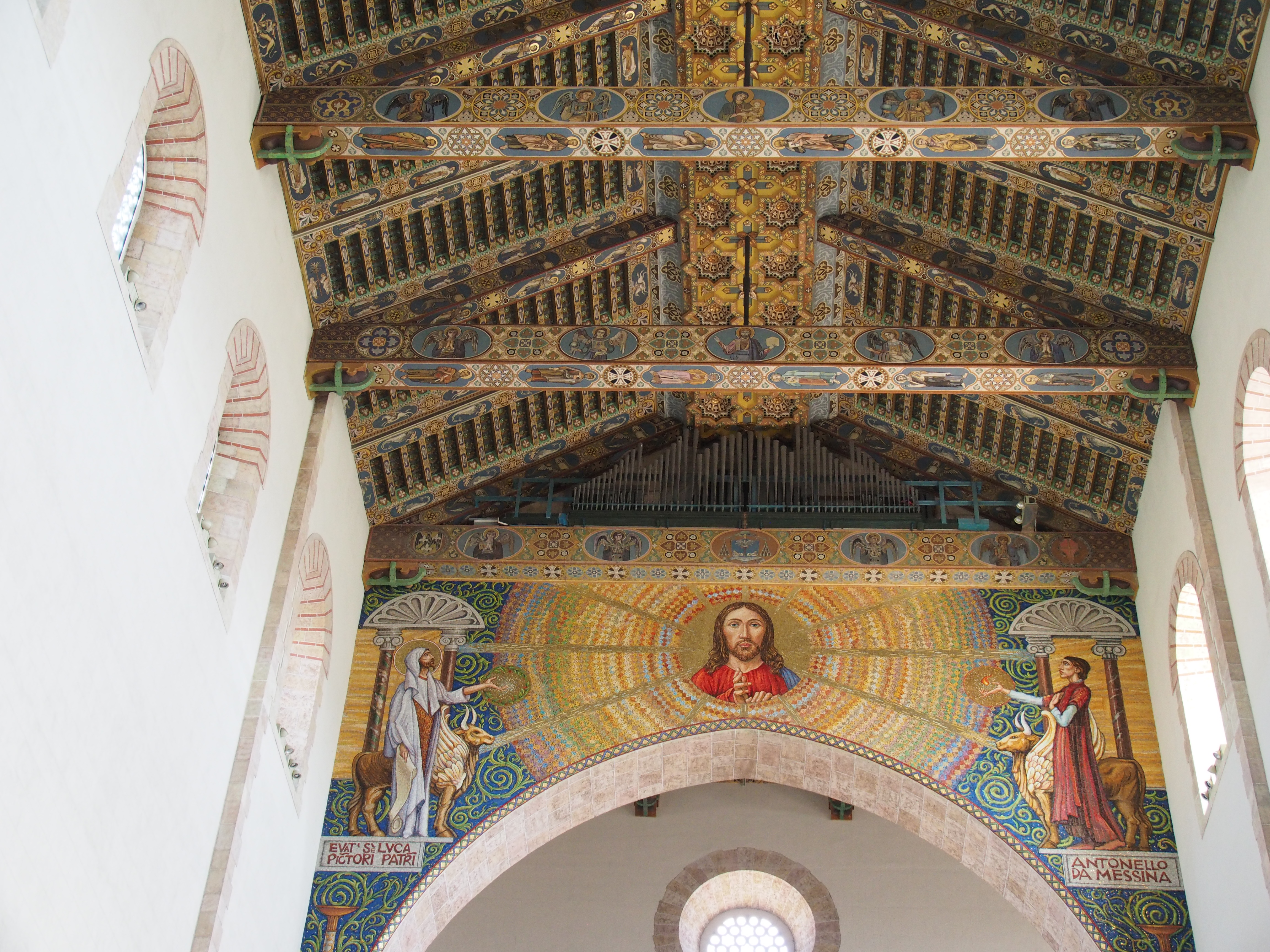 Innenraum mit bemalter Holzdecke der Kathedrale von Messina